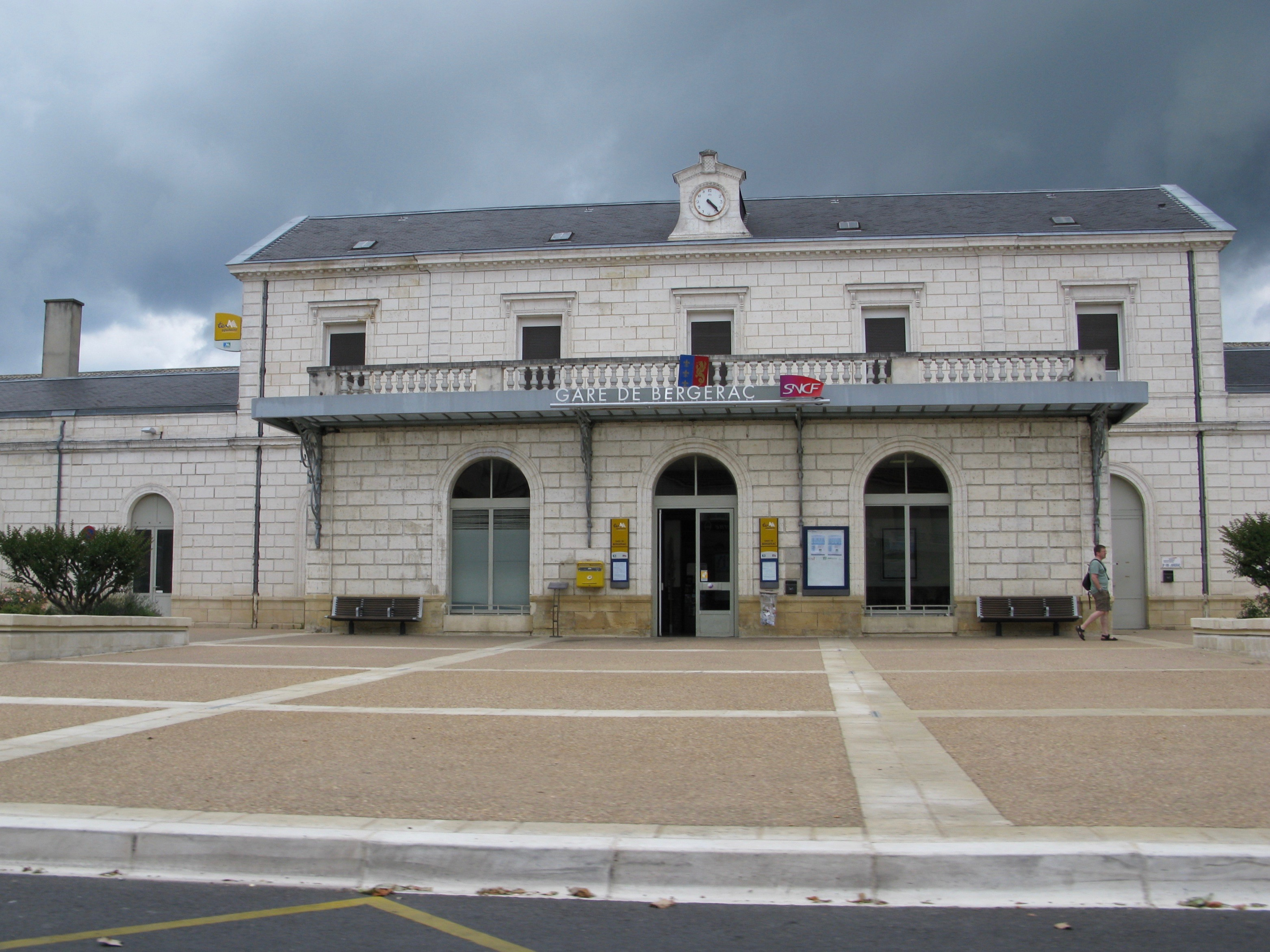 La gare de Bergerac